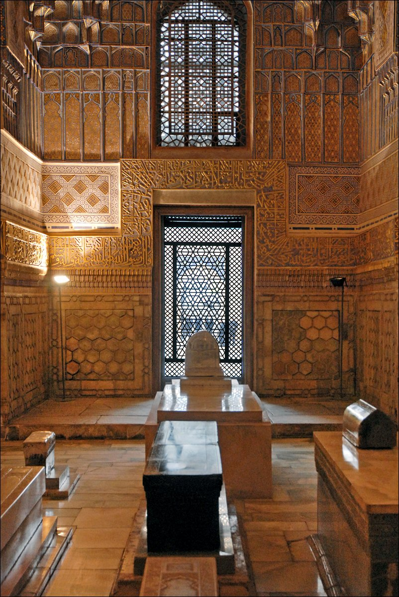 Au centre, la dalle funéraire noire en néphrite est celle de Tamerlan (Amir Temur 1336-1405). Elle a été brisée par Nadir Shah en 1740. Le véritable tombeau est exactement en dessous dans la crypte mais il est inaccessible aux visiteurs. A droite au premier plan, la dalle funéraire de son petit-fils : Muhammad Sultan (1374-1403) qui a fait construire ce mausolée pour Tamerlan mais qui est décédé avant lui. Au fond, au centre, la dalle funéraire de Mir Said Baraka, le maître spirituel de Tamerlan, mort en 1404. Le Gour Emir est le mausolée de Tamerlan, dont la République d'Ouzbékistan (d'après l'URSS), a fait un symbole de grandeur et d'indépendance. Les statues de Tamerlan, un conquérant sanguinaire et impérialiste, dans la lignée de Gengis Khan, ont ainsi remplacé celles de Lénine ou de Staline sur toutes les grandes places des cités. Le mausolée Gour Emir) a été construit en 1401 par le petit-fils de Tamerlan, qui y est enterré comme son grand-père et d'autres membres de la famille timouride. Il est somptueusement décoré. A l'origine, le mausolée comprenait également une madrasa (école coranique) et une khanaka (résidence des derviches) situées autour d'une cour centrale. Seul le portail et le mausolée de l'ensemble existent encore. Ils ont été restaurés et l'environnement a été dégagé des habitations secondaires. Le portail d'entrée est l'oeuvre d'un persan Mohamed, fils de Mahmoud, ramené de force de Perse par Tamerlan à la suite de ses conquêtes comme la plupart des architectes et artisans qui ont construit Samarcande. Le style architectural des monuments de Samarcande est de fait très voisin de celui des grands monuments perses, avec néanmoins des caractéristiques esthétiques régionales à Samarcande, Boukhara ou Khiva.